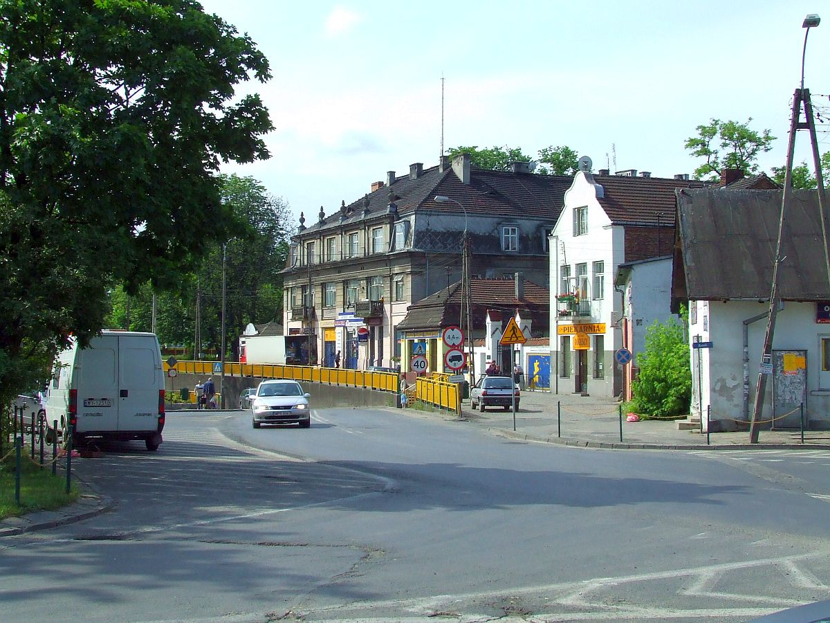 Brwinów, tunel pod torami - wlot